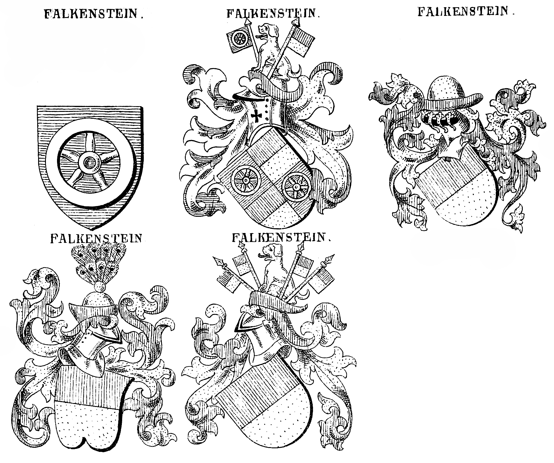 Wappen der hessischen Falkenstein (Nassau)